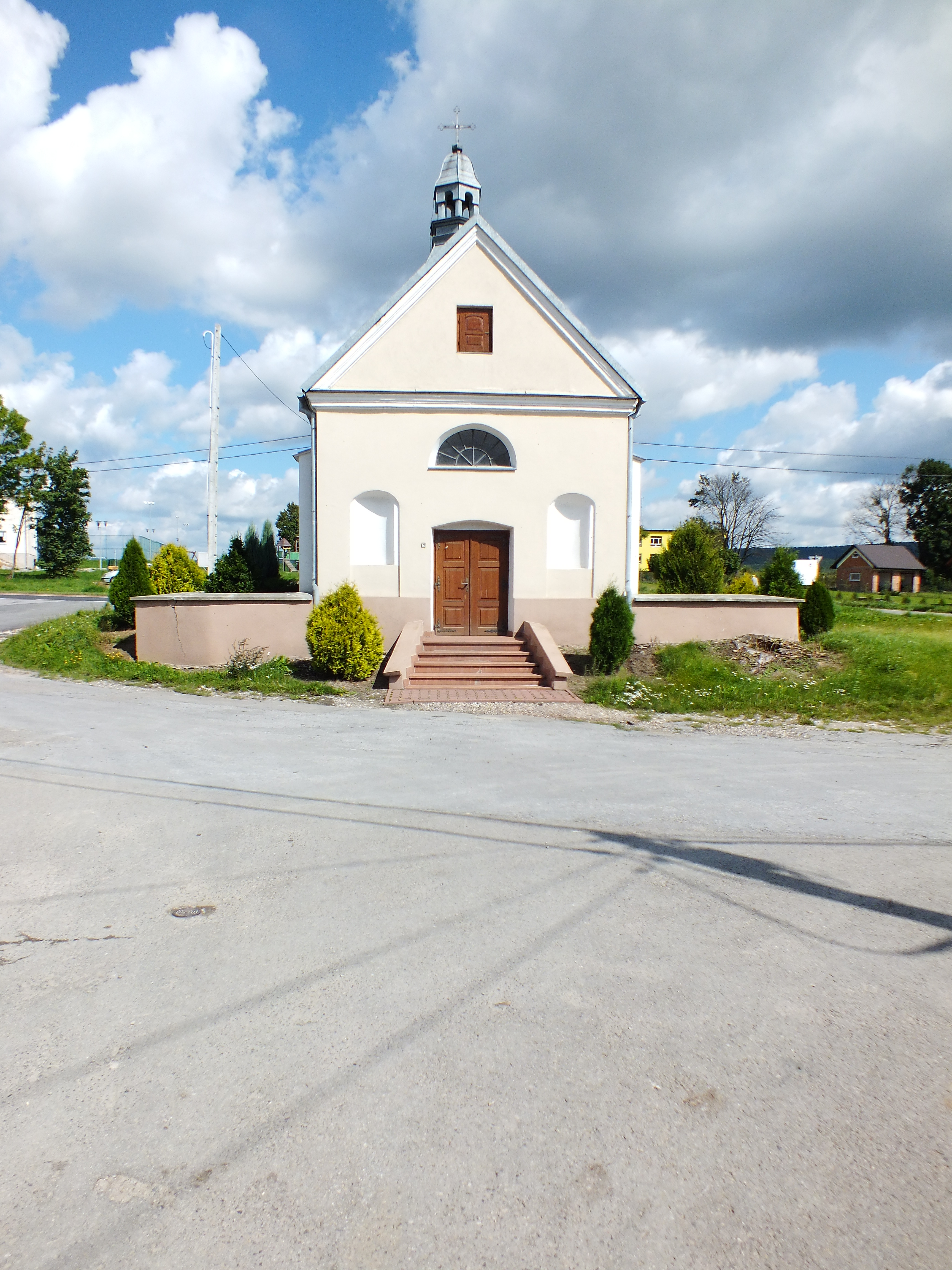 Makoszyn, kaplica, XVIII w.